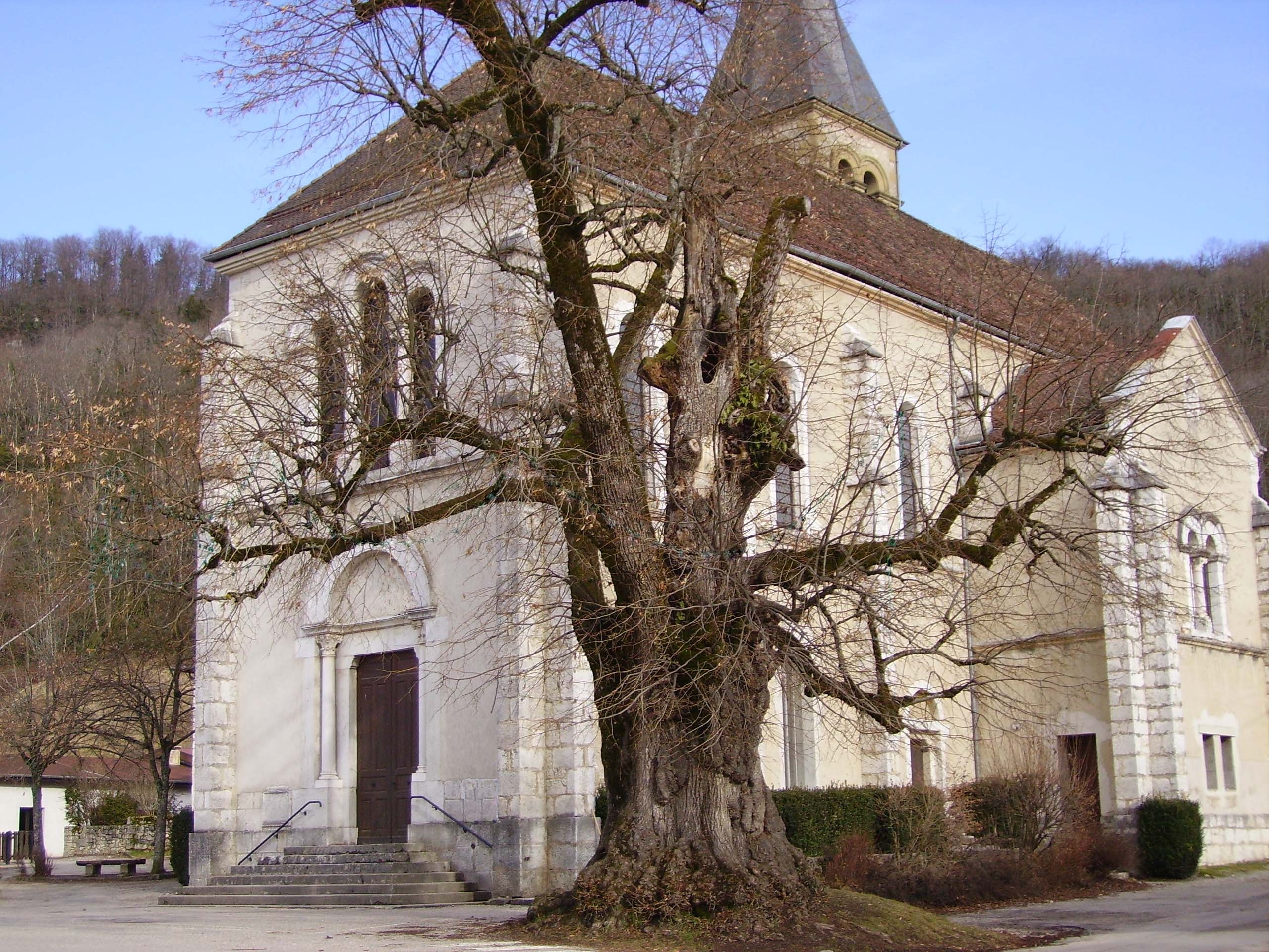 L'église et le tilleul centenaire de Saint-Aupre (Isère, France)